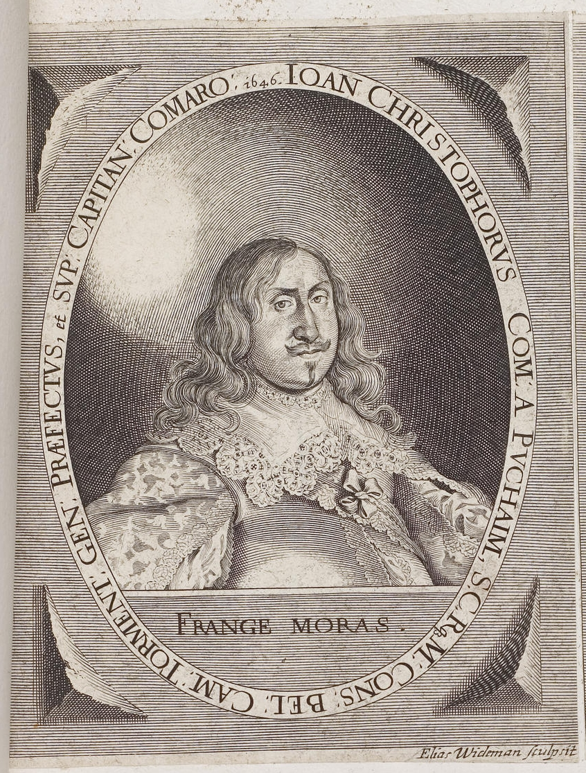 Grafik aus dem Klebeband Nr. 2 der Fürstlich Waldeckschen Hofbibliothek Arolsen Motiv: Johann Christoph von Puchaim (Puchheim) (1605–1657), kaiserl. Generalfeldzeugmeister, seit August 1647 Kommandant der kaiserl. Truppen in Mähren, Schlesien und Niederösterreich